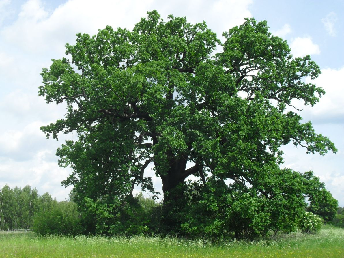 Stary ogromny dąb szypułkowy "Dąb Napoleona" rosnący na polanie przy leśniczówce Lipniki w Jasińcu. Obwód w 2012 - 704 cm!